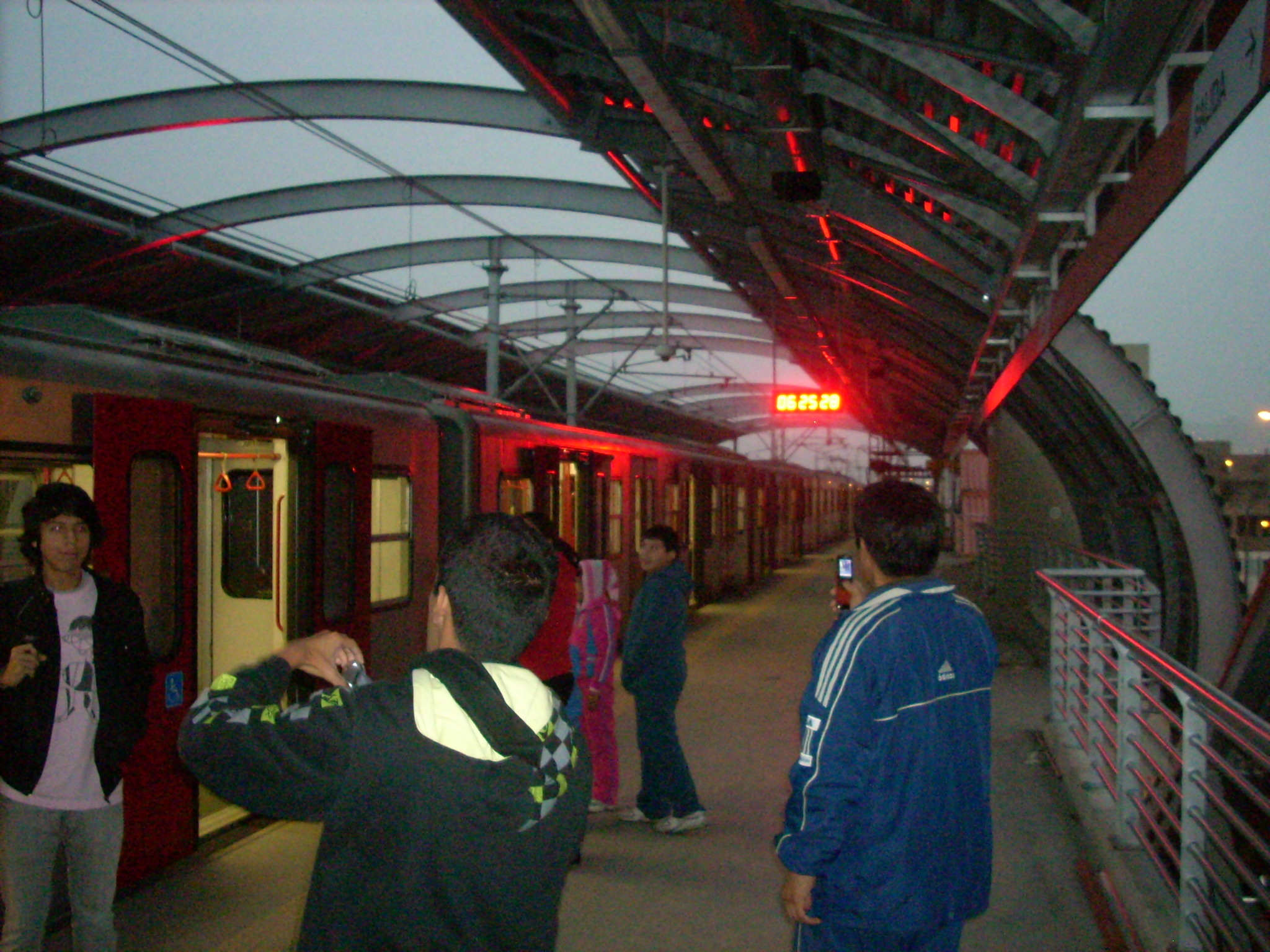 Estacion ubicada en la esquina de Javier Prado y Aviacion. Plataforma en direccion Sur.